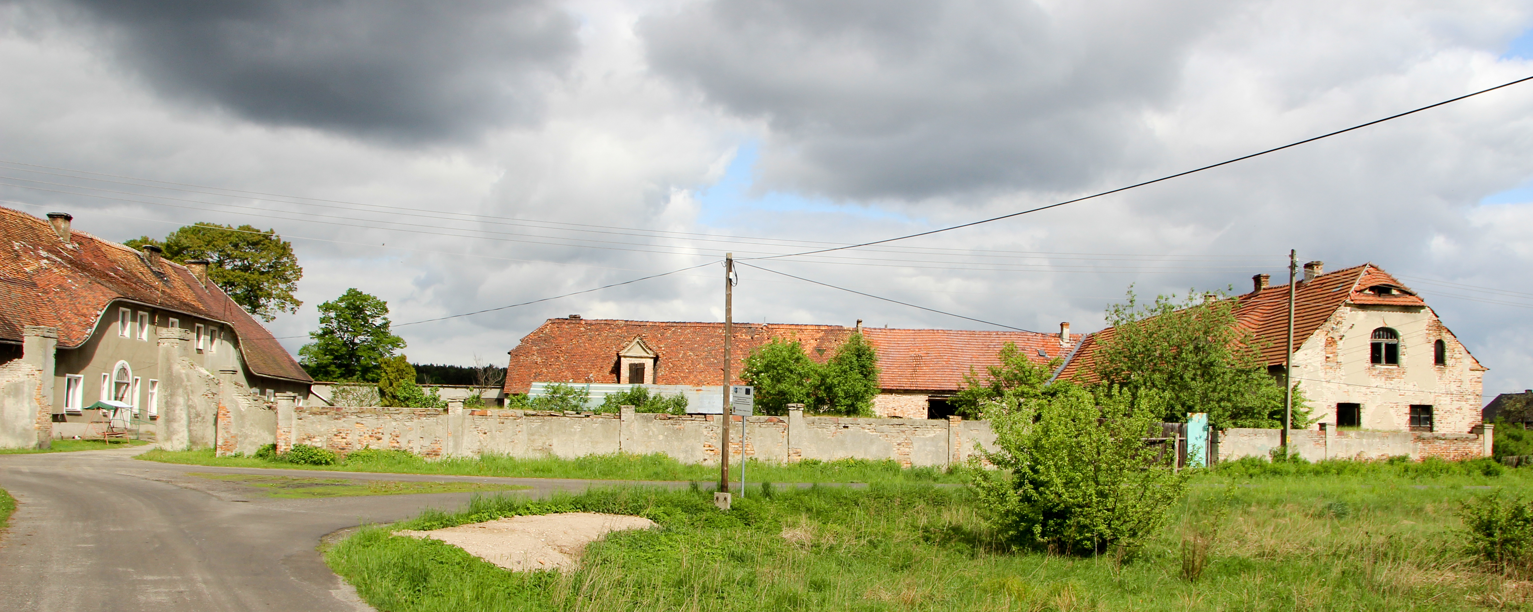 Kościelna Wieś - wieś w Polsce w województwie dolnośląskim w powiecie zgorzeleckim, w gminie Węgliniec.